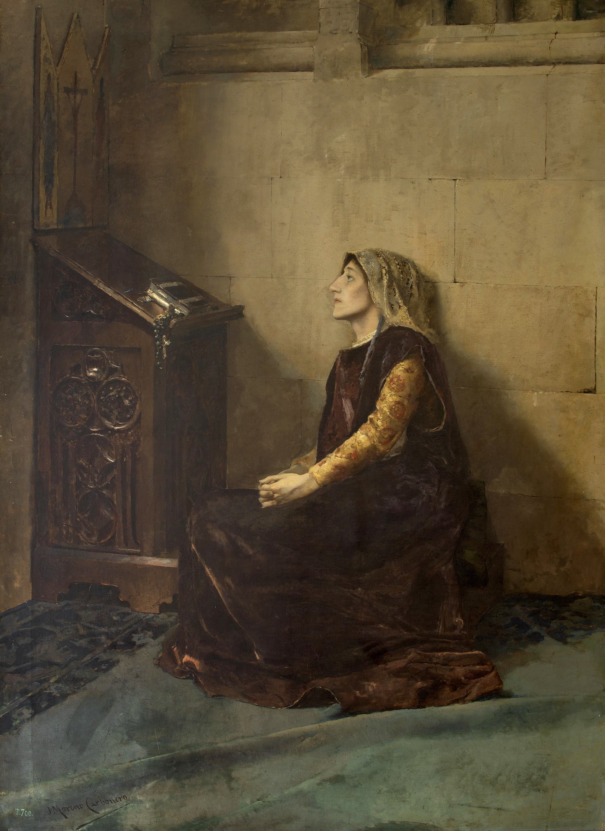 La obra representa a la reina Blanca II de Navarra (1424-1464), que fue hija del rey Juan II de Aragón y de la reina Blanca I de Navarra y primera esposa del rey Enrique IV de Castilla. Fue recluida por su padre en el castillo de Olite para evitar que pudiera reclamar su derecho a reinar de forma efectiva, tras la muerte de su hermano Carlos. Posteriormente, fue entregada a su hermana menor Leonor y a su marido Gastón, condes de Foix, que pretendían la corona navarra a costa de eliminar en sus pretensiones a Blanca. Para evitarlo, hizo testamento cediendo sus derechos sobre Navarra a Enrique IV de Castilla, y excluyó de tales derechos a Leonor y su descendencia, aunque Juan II evitó (de forma ilegítima) que la unión de Navarra y Castilla se llevase a cabo, confirmando a Leonor como su heredera en Navarra. Blanca II murió probablemente envenenada en su posterior encierro en el castillo de Orthez (Francia).